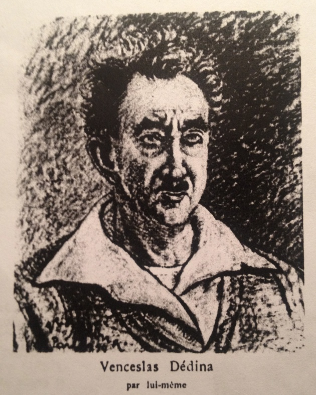 Venceslas Dedina par lui-même